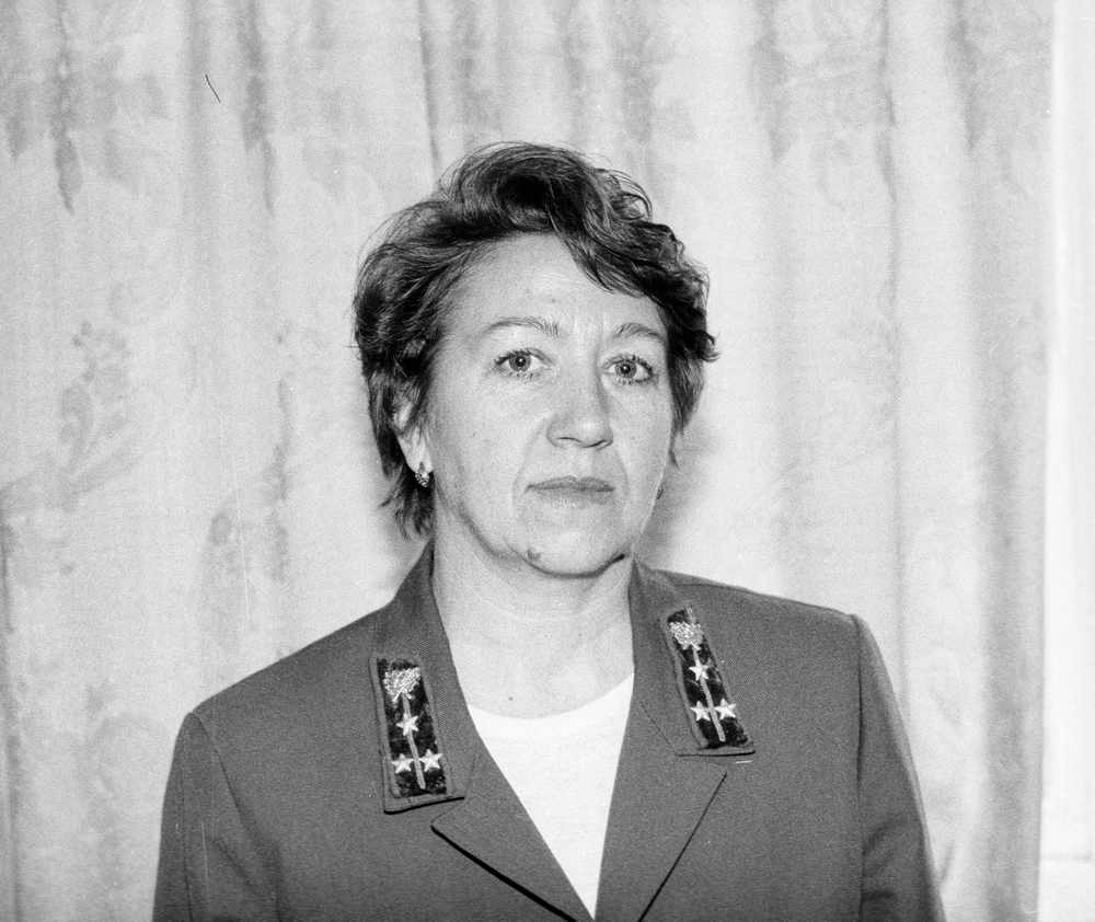 Любовь Ивановна Телегина (4.02.1951—14.05.2007) — начальник дендрологического отдела национального парка «Плещеево озеро» (19??—2007), заслуженный лесовод Российской Федерации (1997), почетный работник охраны природы (05.2005), кавалер памятного знака «За заслуги перед городом Переславлем-Залесским» (2002). На костюме петлицы по должности «мастер леса».